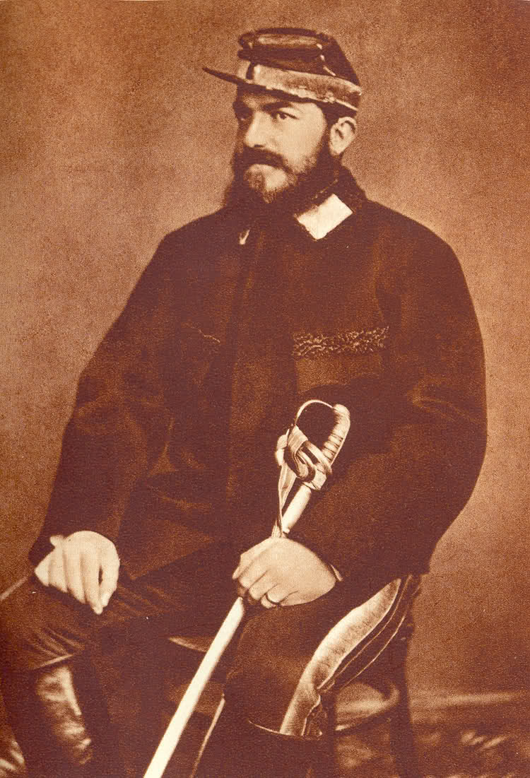 Kralj Milan I Obrenović, prvi kralj Srbije posle kosovskog boja, Naslednik kneza Mihajla Obrenovića i otac kralja Aleksandra Obrenovića